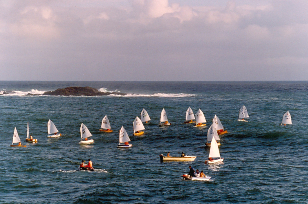 Clube Naval de Santa Maria, ilha de Santa Maria, Açores: primeira regata organizada.